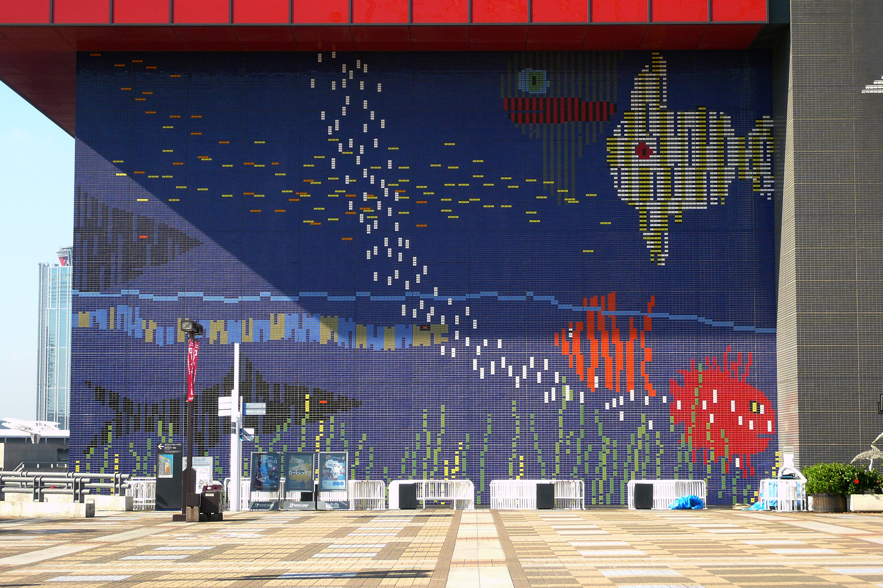 Osaka Aquarium KAIYUKAN (Ring of Fire Aquarium) in Osaka, Osaka prefecture, Japan